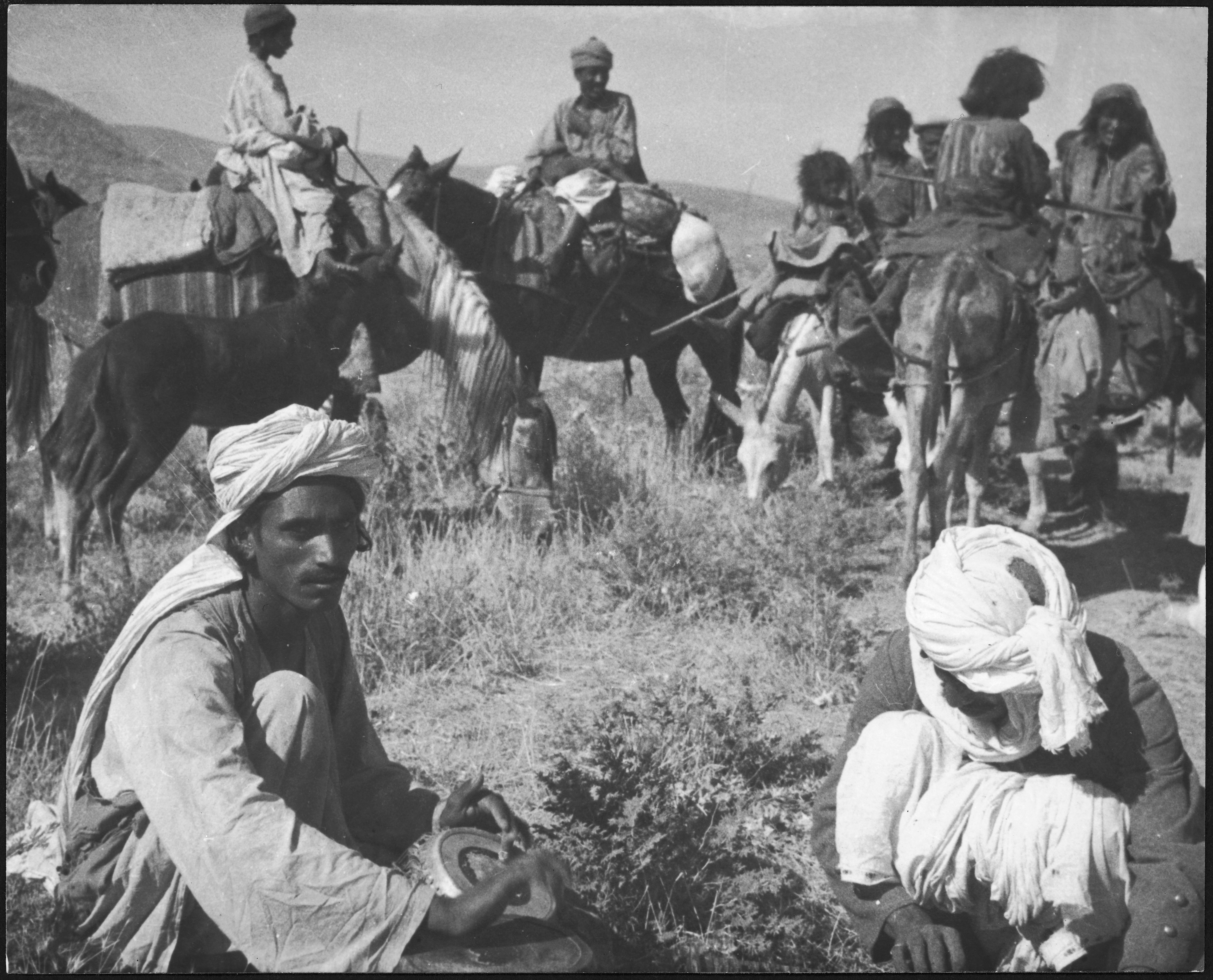 Afghanistan, Bala Murgab (Bala Murghab, Morghab): Menschen; Männer mit Musikinstrumenten und Reiter